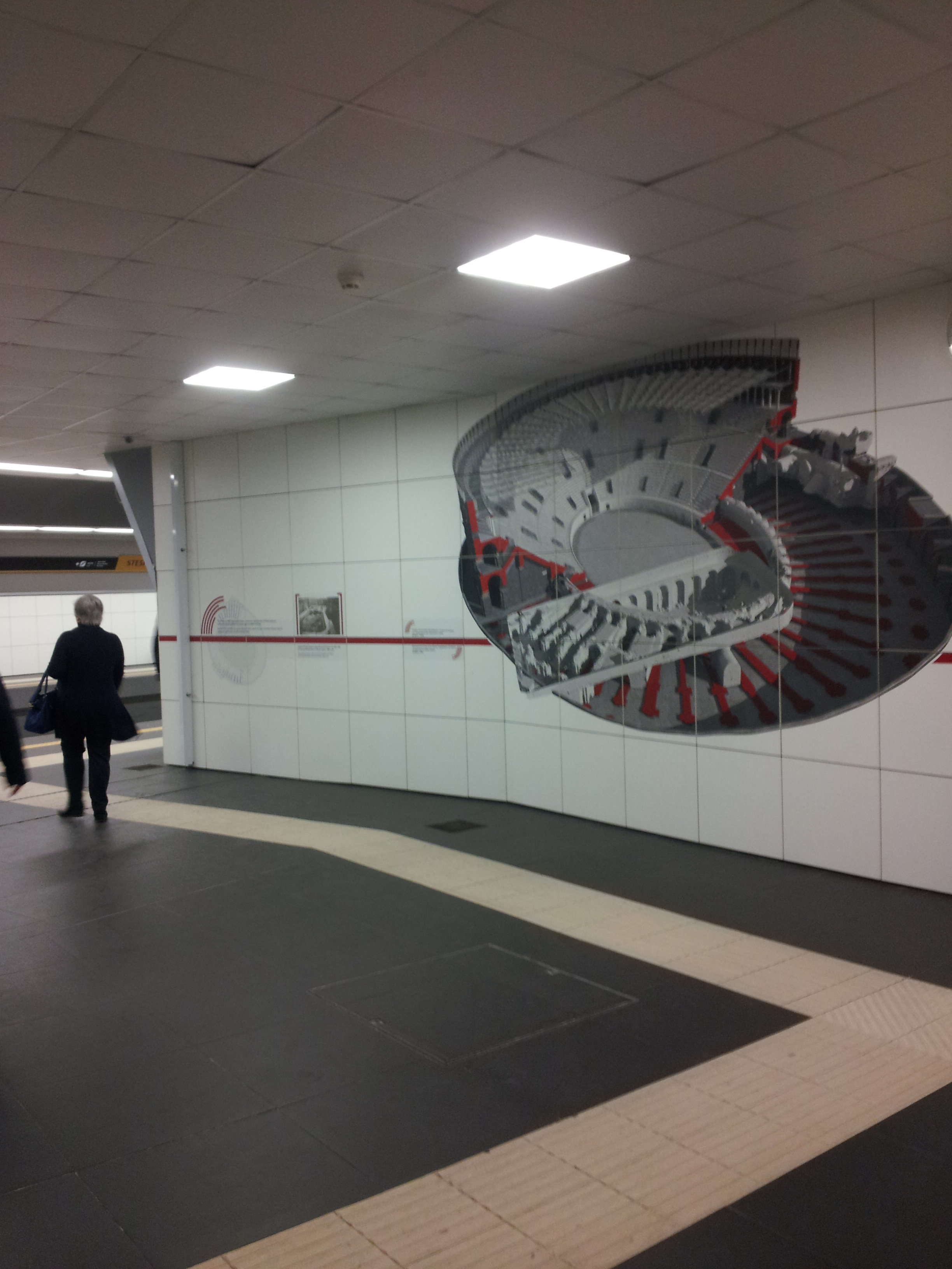 Atrio livello banchine